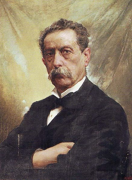 medico, accademico e rettore italiano